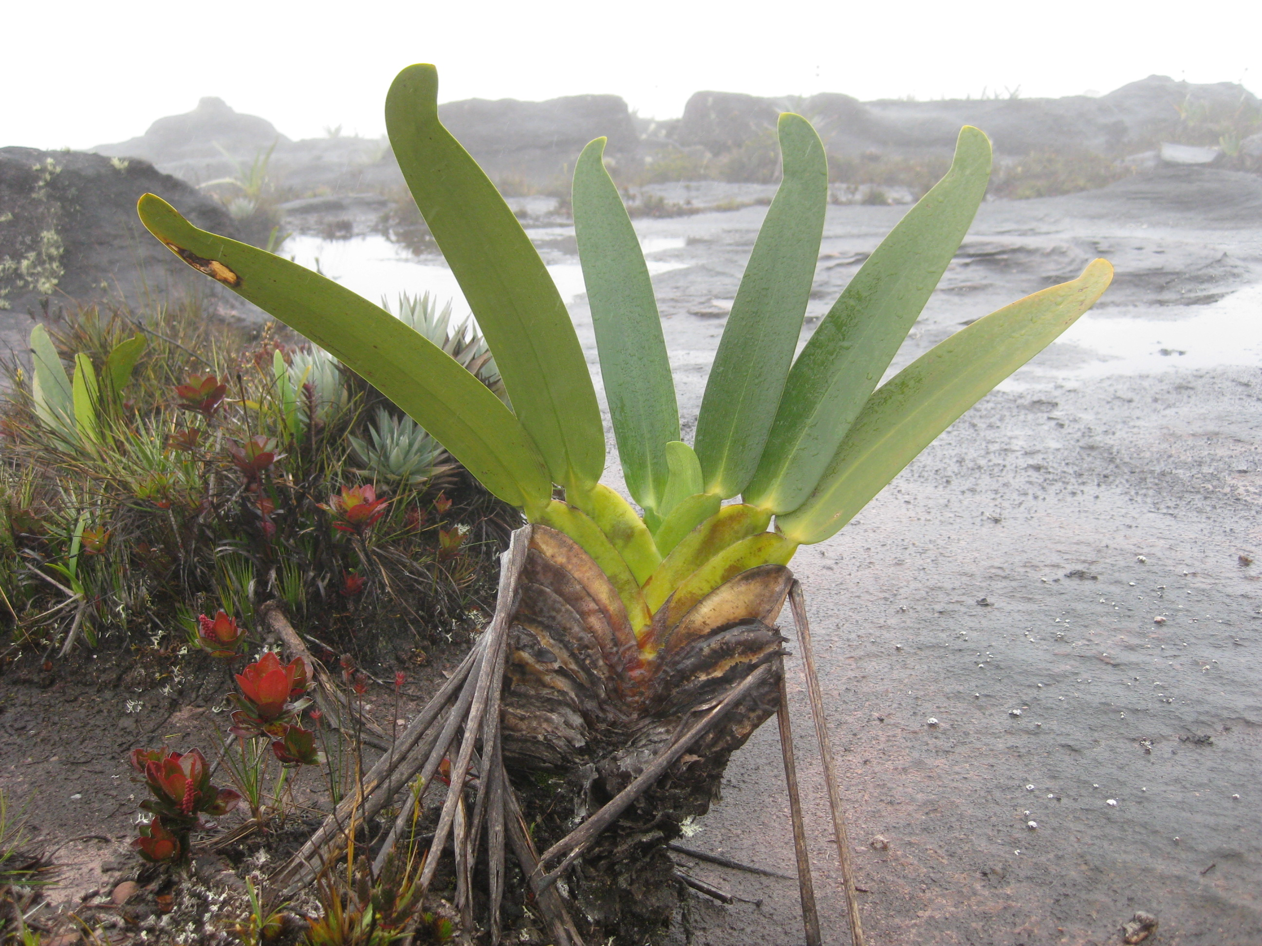 Mount Roraima, Venezuela